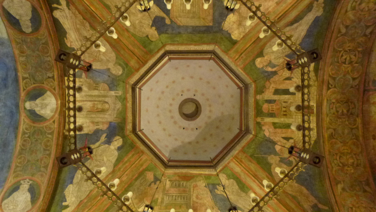 St. Maria und Clemens - Innenansicht - Decke